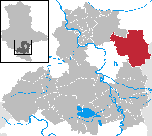 Landsberg in Saxony-Anhalt - Saalekreis